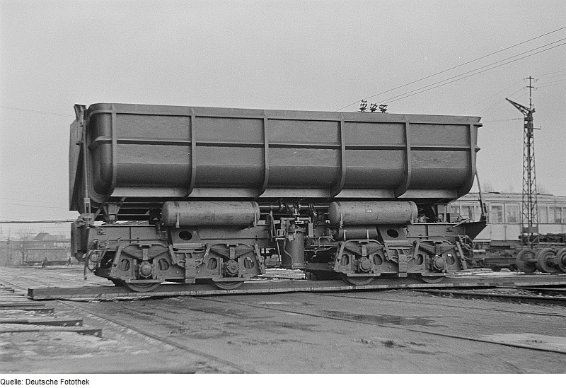 Original image description from the Deutsche Fotothek Außenansicht eines Kippwaggons